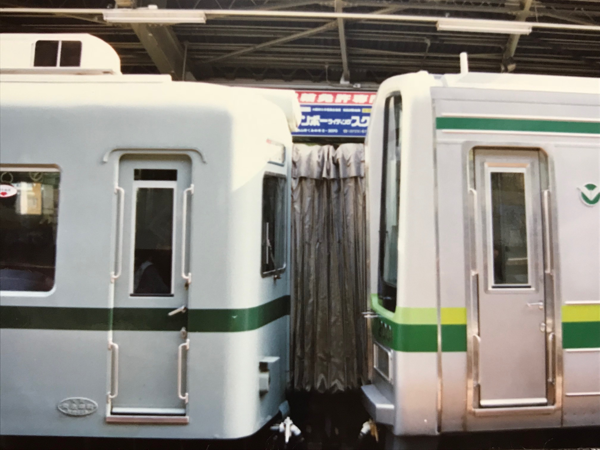 こんけつ1